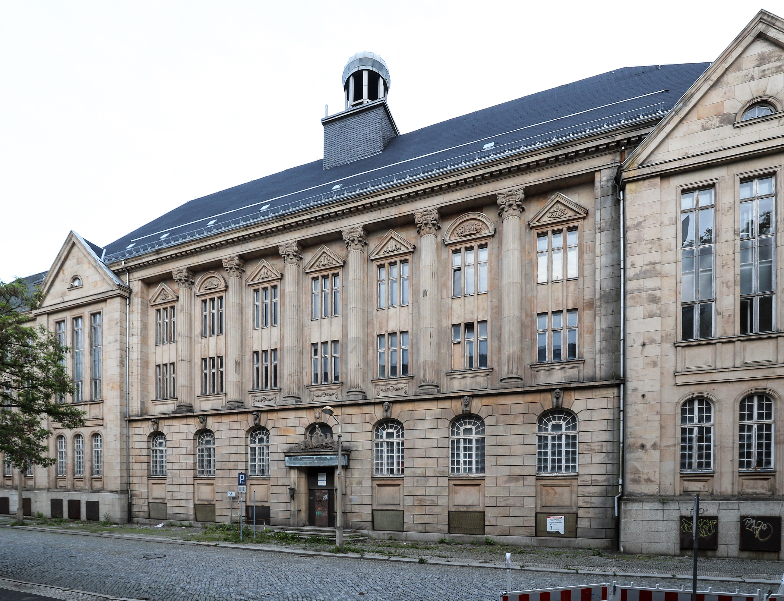 Verwaltungsgebäude der Weberei Ernst Seifert erbaut 1928, später VEB Palla Textilwerke Glauchau.